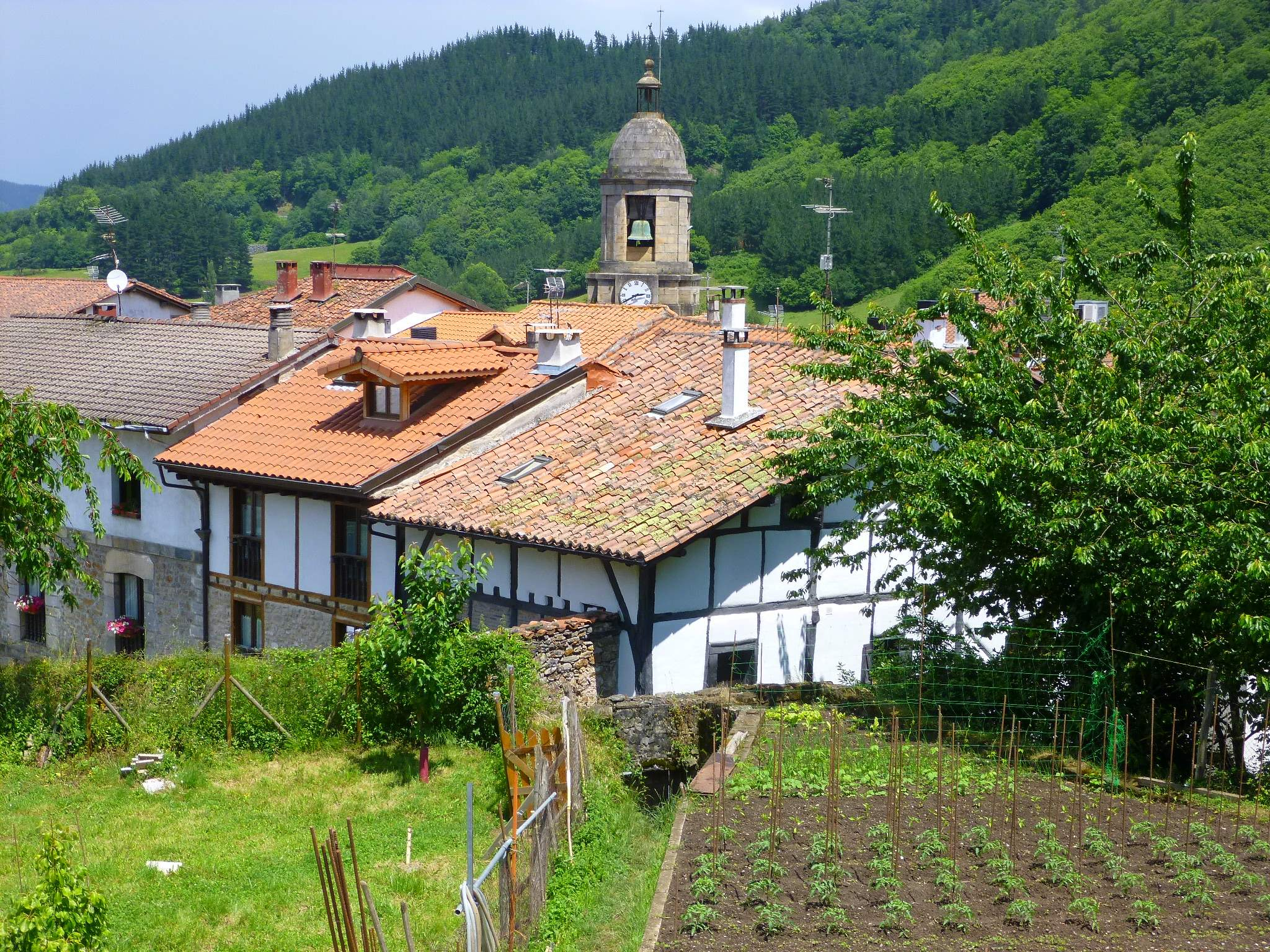 Salinas de Léniz (Leintz-Gatzaga), Gipuzkoa